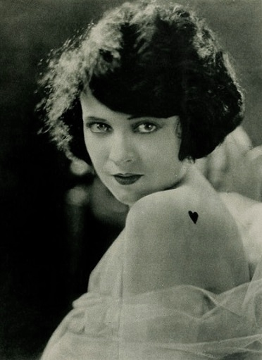 Jacqueline Logan